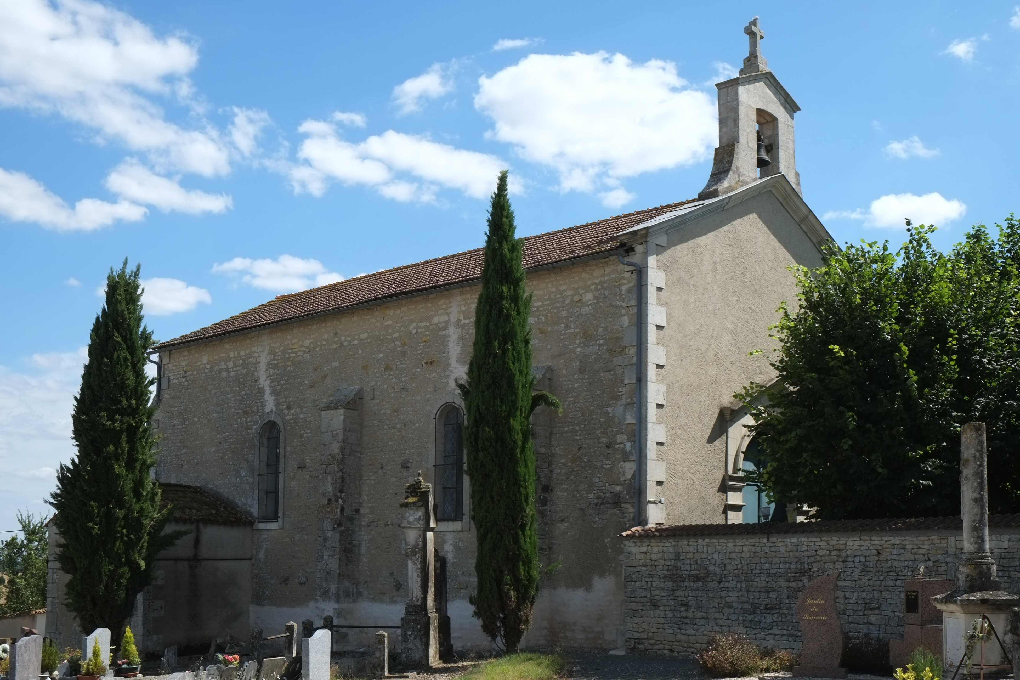 Église Saint-Pierre à Saint-Pierre-d'Amilly Charente-Maritime France